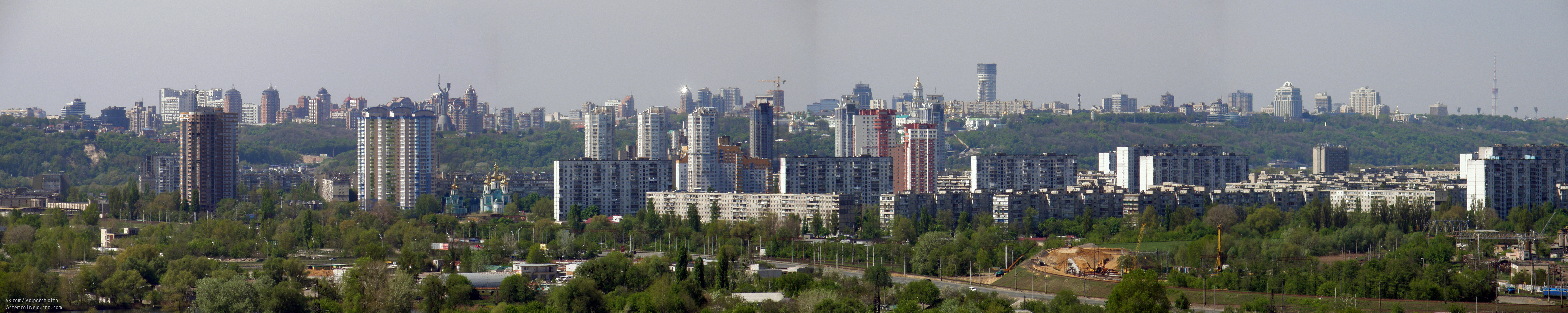 Березняки